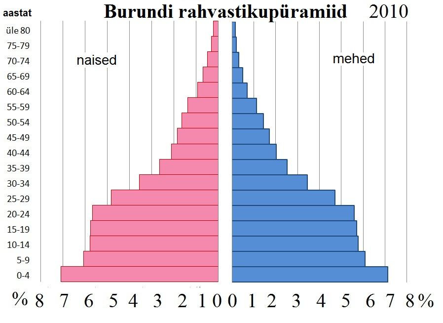 Burundi rahvastikupüramiid seisuga 2010. aasta